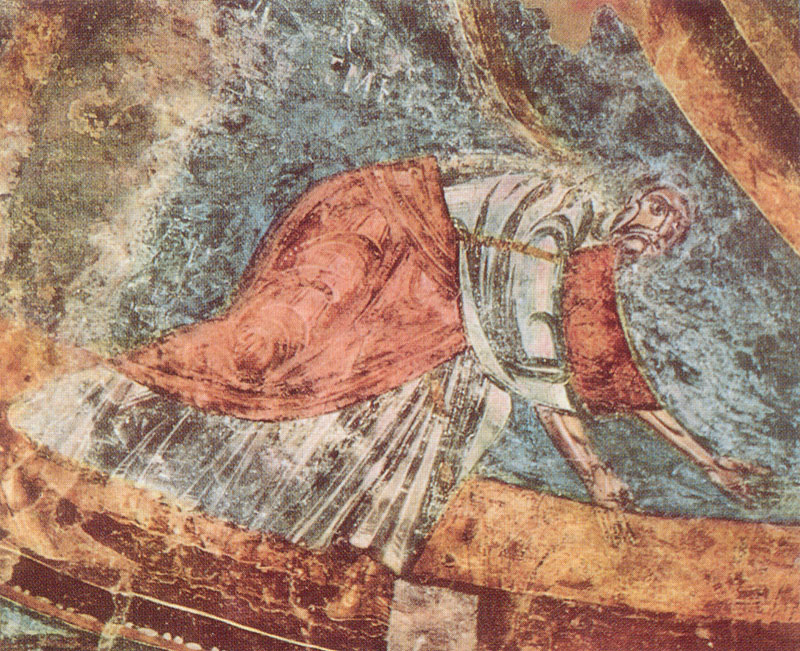 Galliano - Cantù Il profeta Geremia - affresco nell'abside della Basilica di San Vincenzo in Galliano